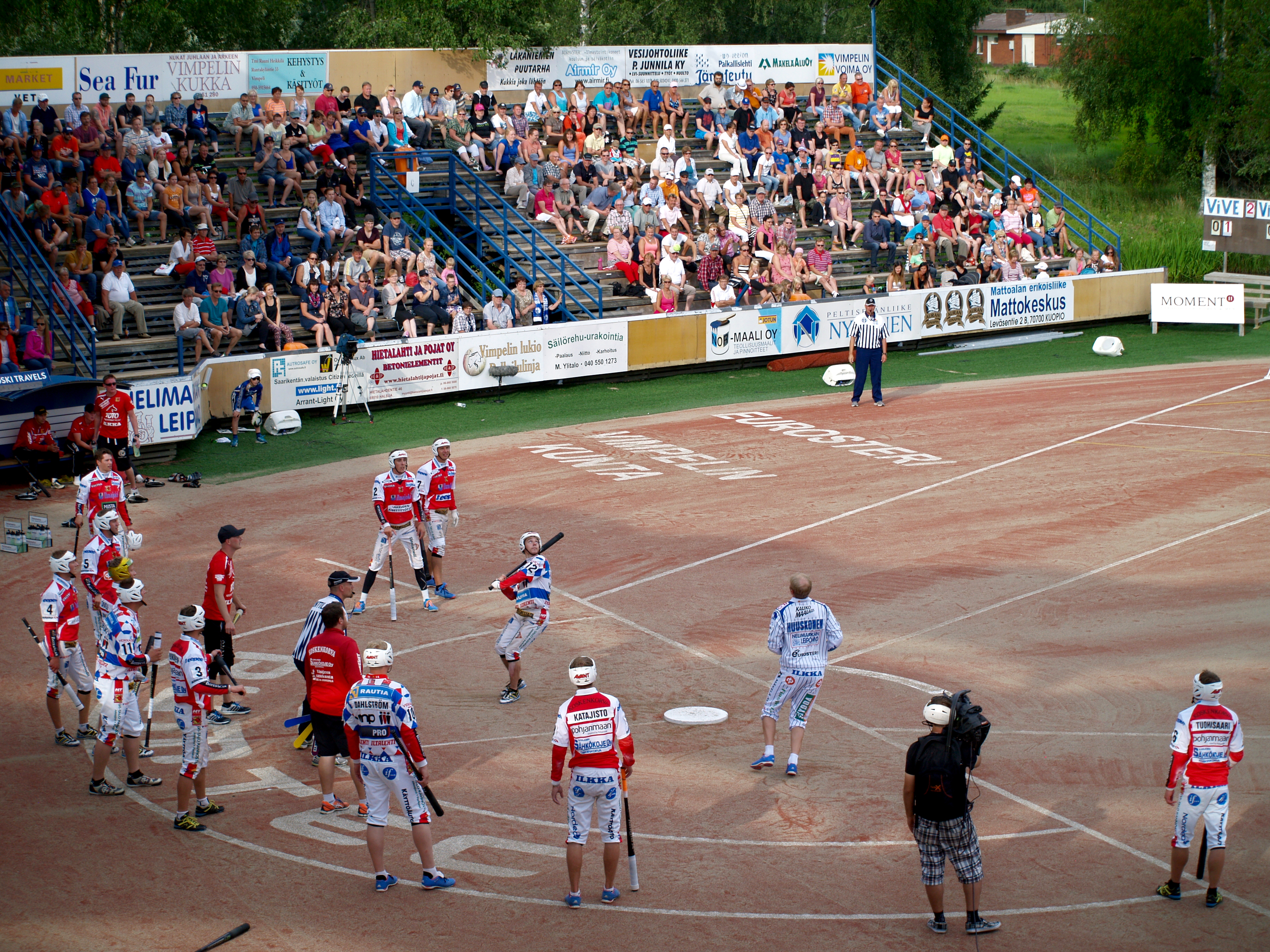 Vimpelin Veto - Koskenkorvan Urheilijat pesäpallo-ottelu 1.8.2014.